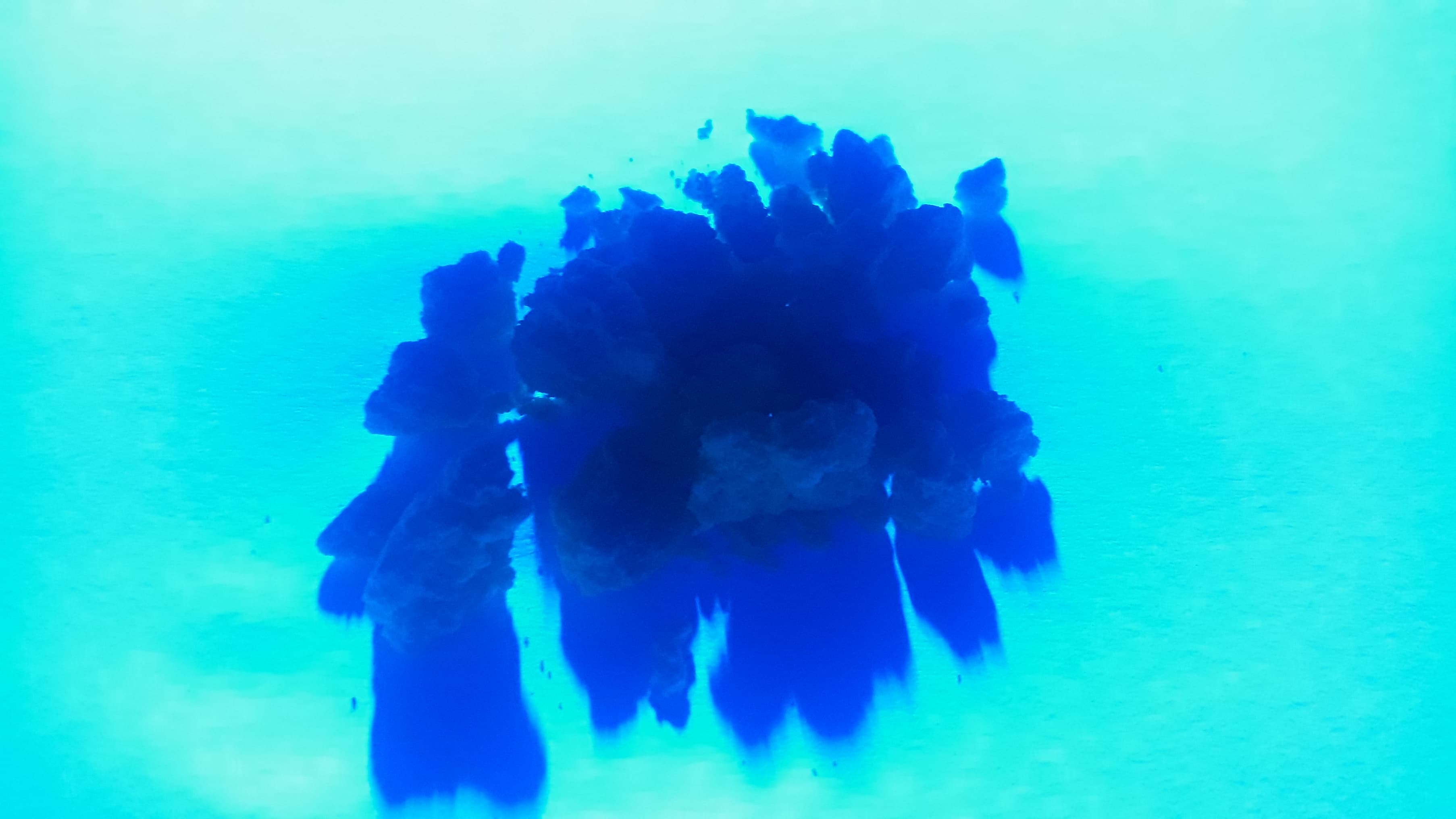 Dibenzalacetone crystals under UVA, absorbtion of low wavelenght light